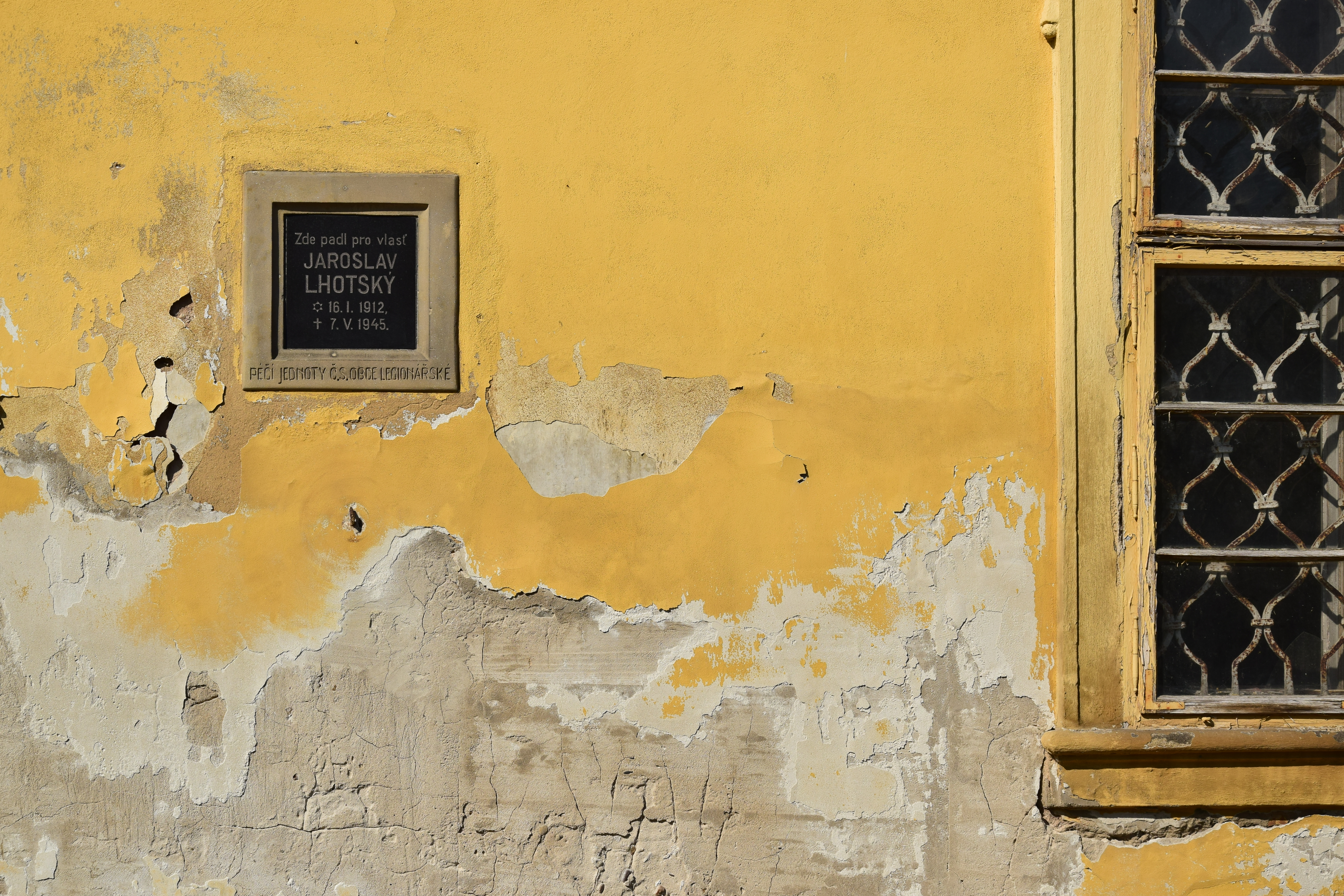 Zámek Cítoliby – pamětní deska Jaroslava Lhotského